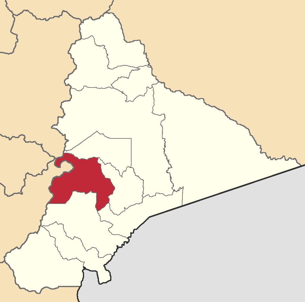 Mapa localizador del cantón en Morona-Santiago, Ecuador